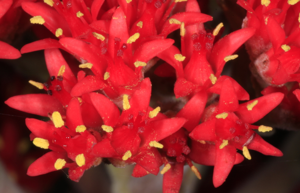 Crassula perfoliata